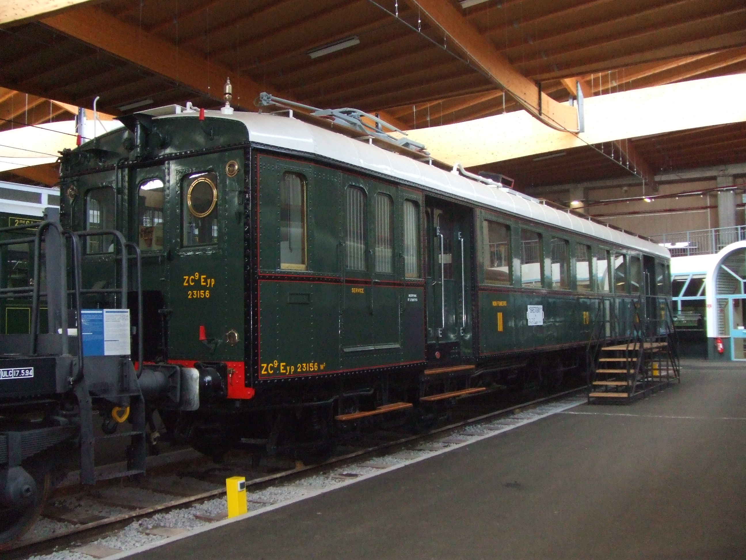 P.O. BTH/Schneider/Jeumont 1,600V dc Z-23100 Class emu No.Z- 3156 (SNCF No.Z4156) of 1938. At the SNCF Museum, Mulhouse, 3/07.